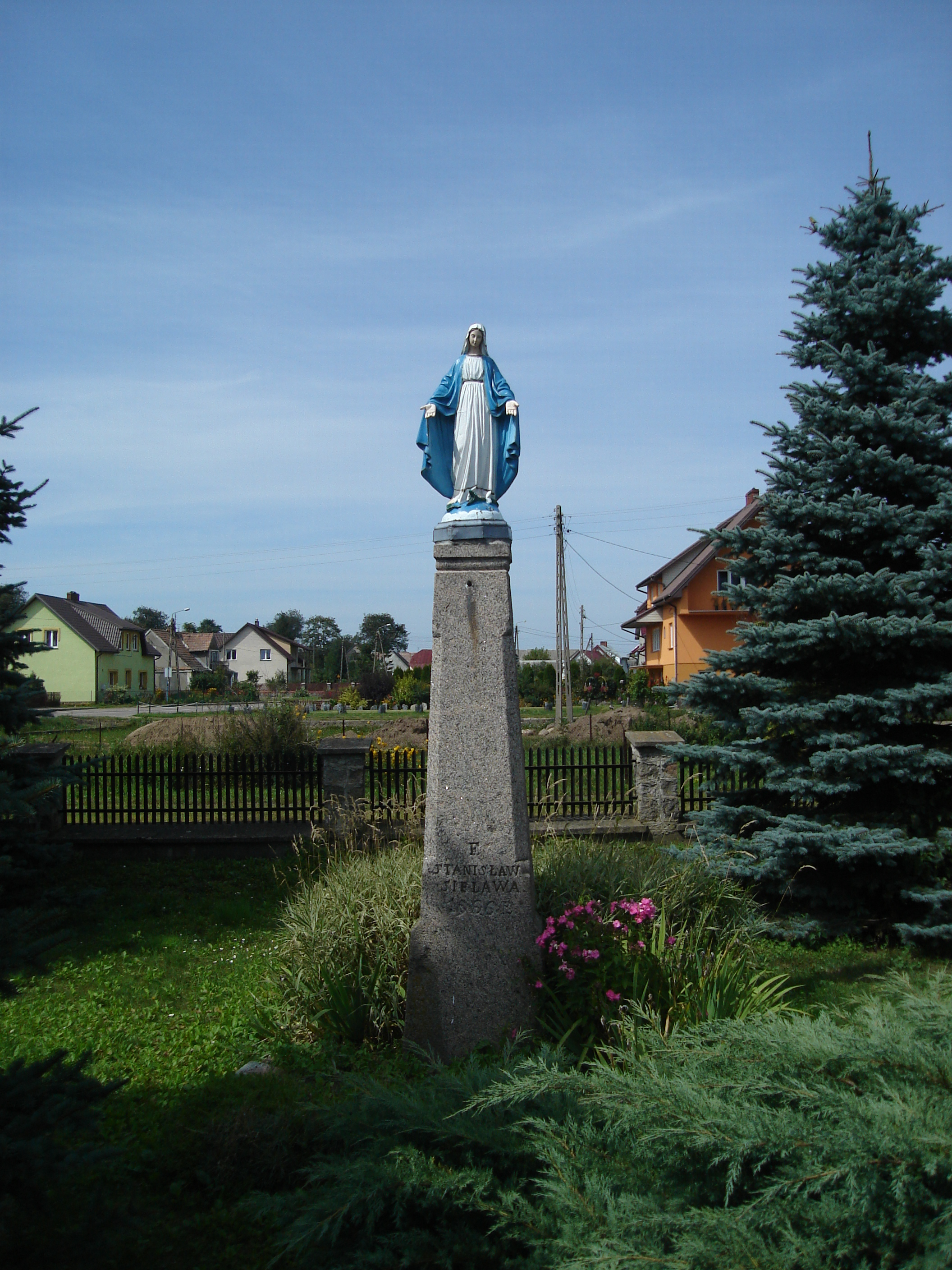 Figura na terenie kościoła w Borkowie